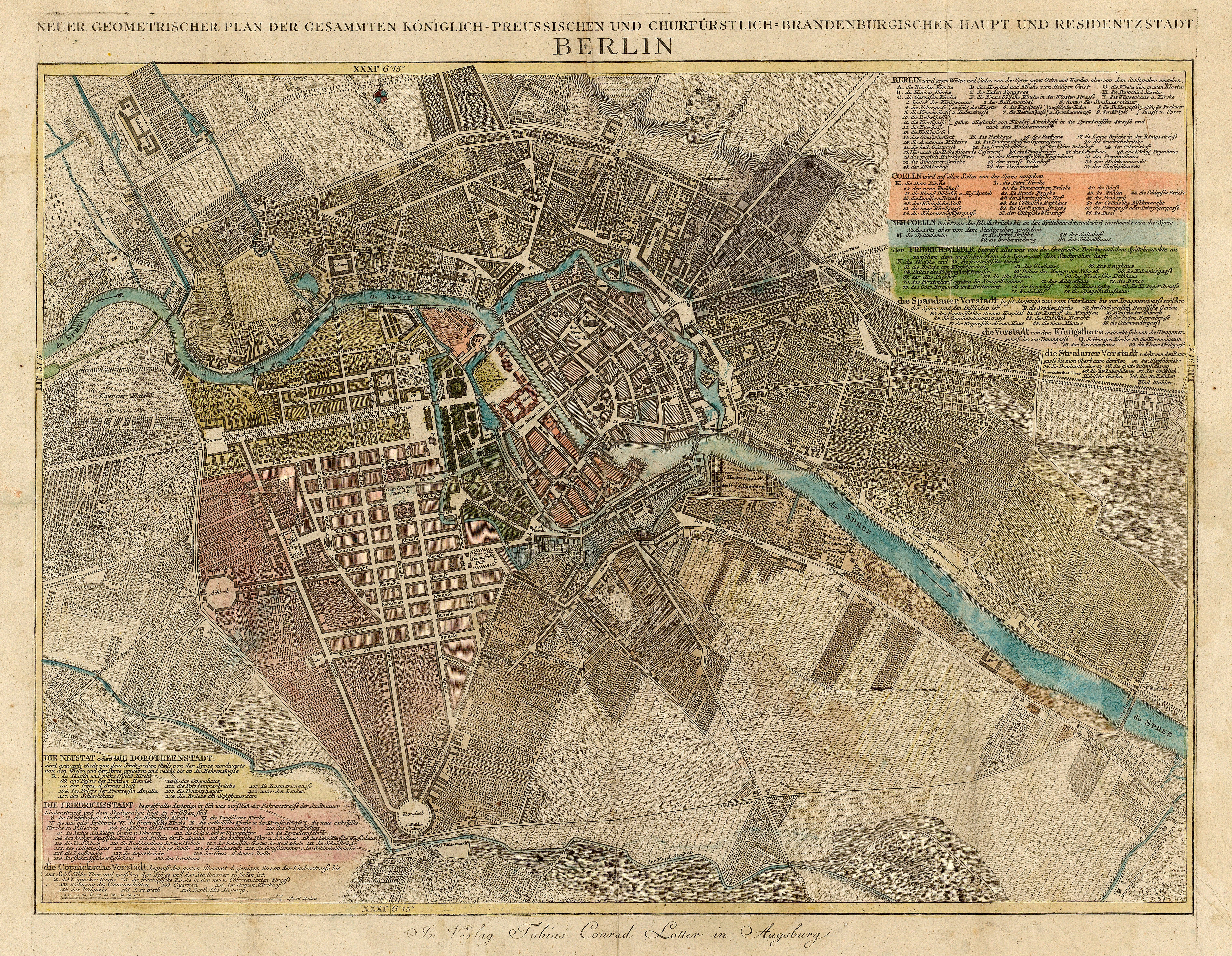 Kopie der Karte von J.C. Rhode aus demselben Jahr. Rechts oben und links unten eine Legende mit 136 Referenzen zu Gebäuden der Stadt unterteilt nach 10 Stadtteilen, darunter eine Maßstabsleiste "0-300 Rheinl. Ruthen". Im Kartenrahmen sind die geografischen Koordinaten der Berliner Sternwarte auf dem Marstall eingetragen: Breite LII° 31'5, Länge XXXI°6'15.